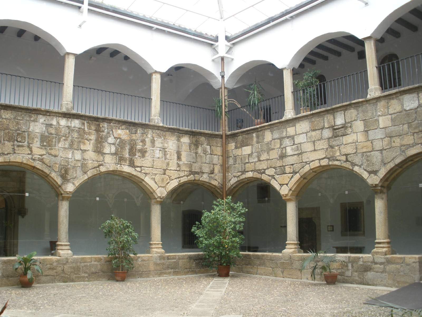 Cáceres - Monasterio de San Francisco el Real, claustro Europa